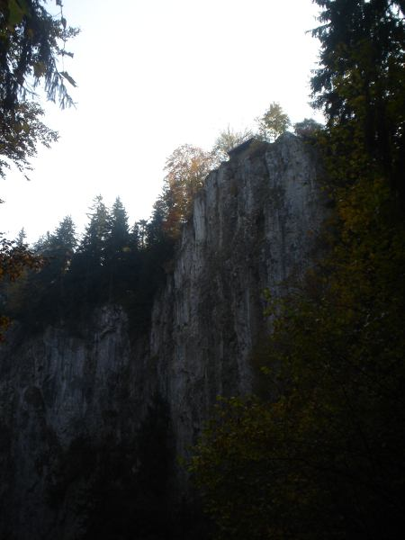 Česky: Horní můstek propasti Macocha z dolního můstku